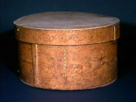 Øskje fra Valle i Setesdal. Dekorert av Tarald Sveinsson Haamaaren omkring 1820. Diameter 47 cm. Norsk Folkemuseum NF.1913-0802.